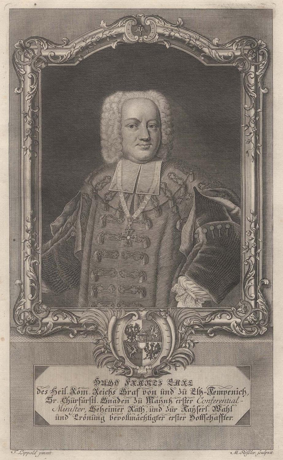 Kupferstich "Hugo Franz Carl von und zu Eltz-Kempenich" von Rößler nach Lippold